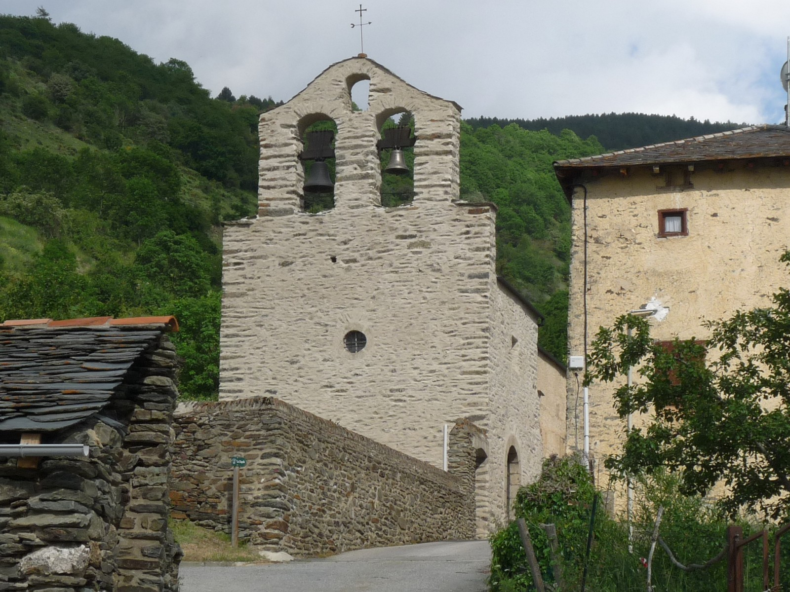 Eglise de Valcebollère, Pyrénées-Orientales, France